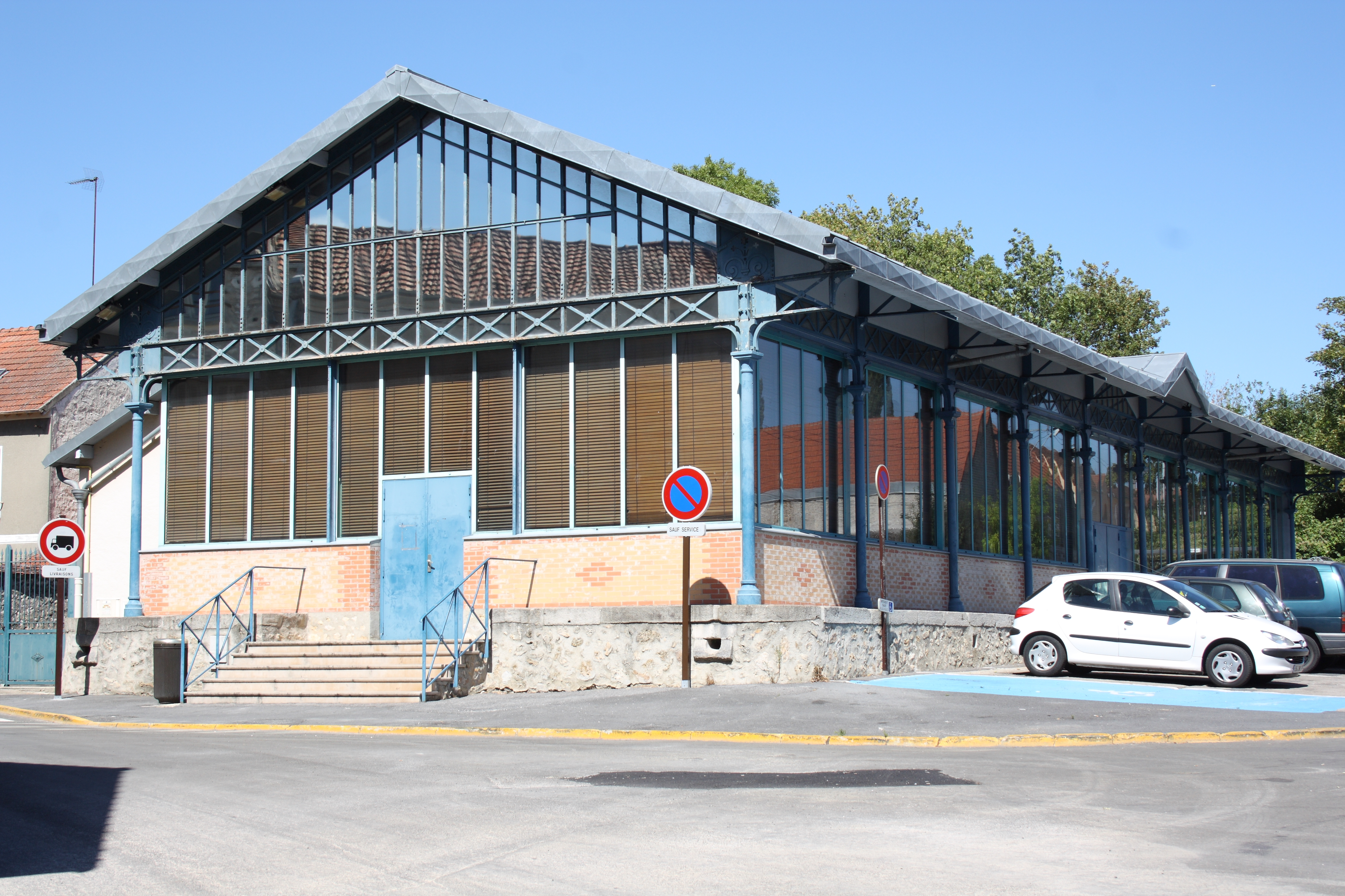 Markthalle (Halle aux veaux) in La Ferté-Gaucher im Département Seine-et-Marne (Île-de-France)